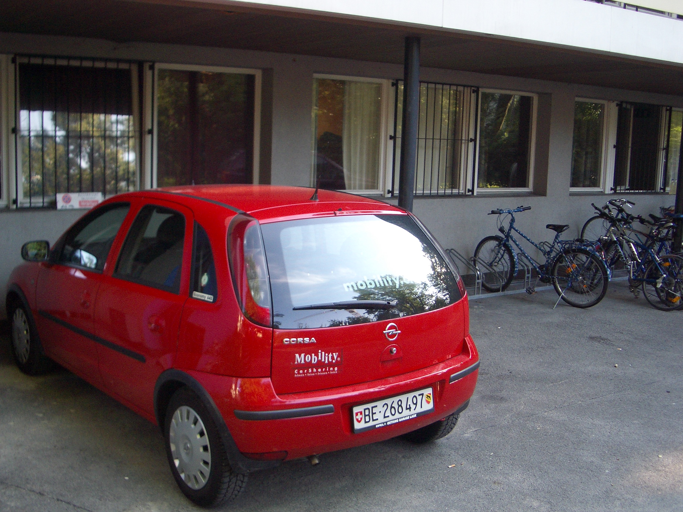 Cotxe de la cooperativa de carsharing Mobility, model Opel Corsa. Estacionat a un aparcament de carsharing davant de l'alberg juvenil de Bern (Suïssa)